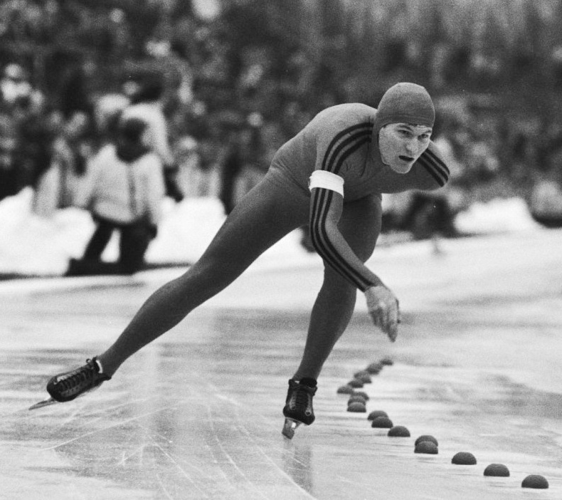 Nederlandse kampioenschappen schaatsen allround mannen in Deventer; Rob Vunderink in actie op de 10 kilometer.